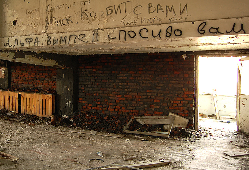 Граффити на стене бесланской школы № 1.